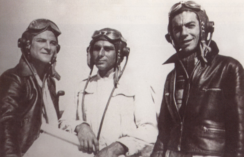 אנשי מחלקת הטיס של הפלמח מתאמנים בנען 1945 ארכיון ההגנה